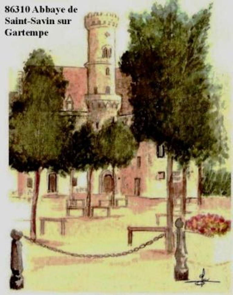 Dessin N° 05 de Saint-Savin-sur-Gartempe